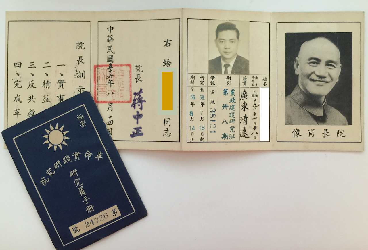 革命實踐研究院 - 研究員手冊 (1967)